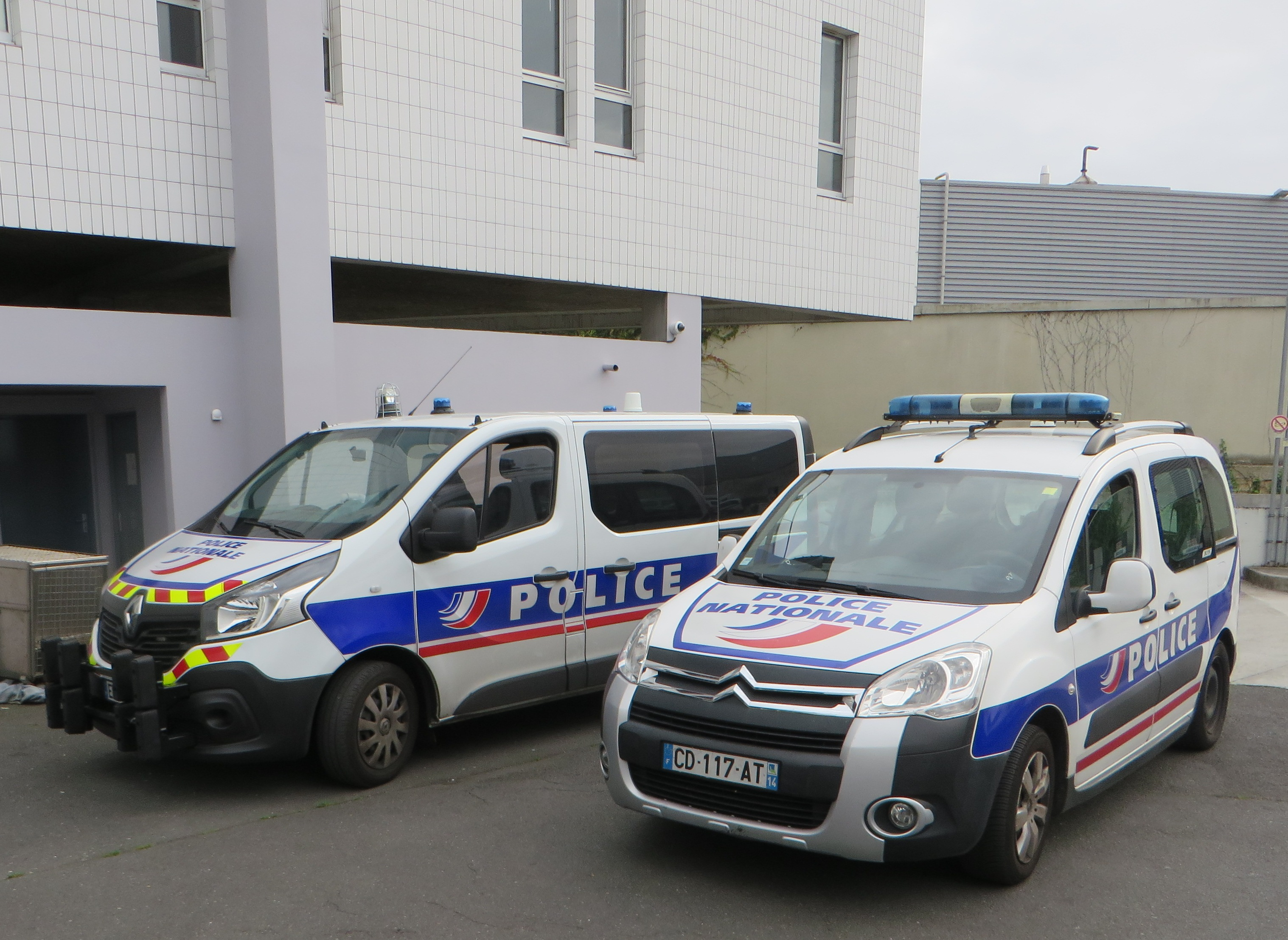 Franse politie (Police Nationale)